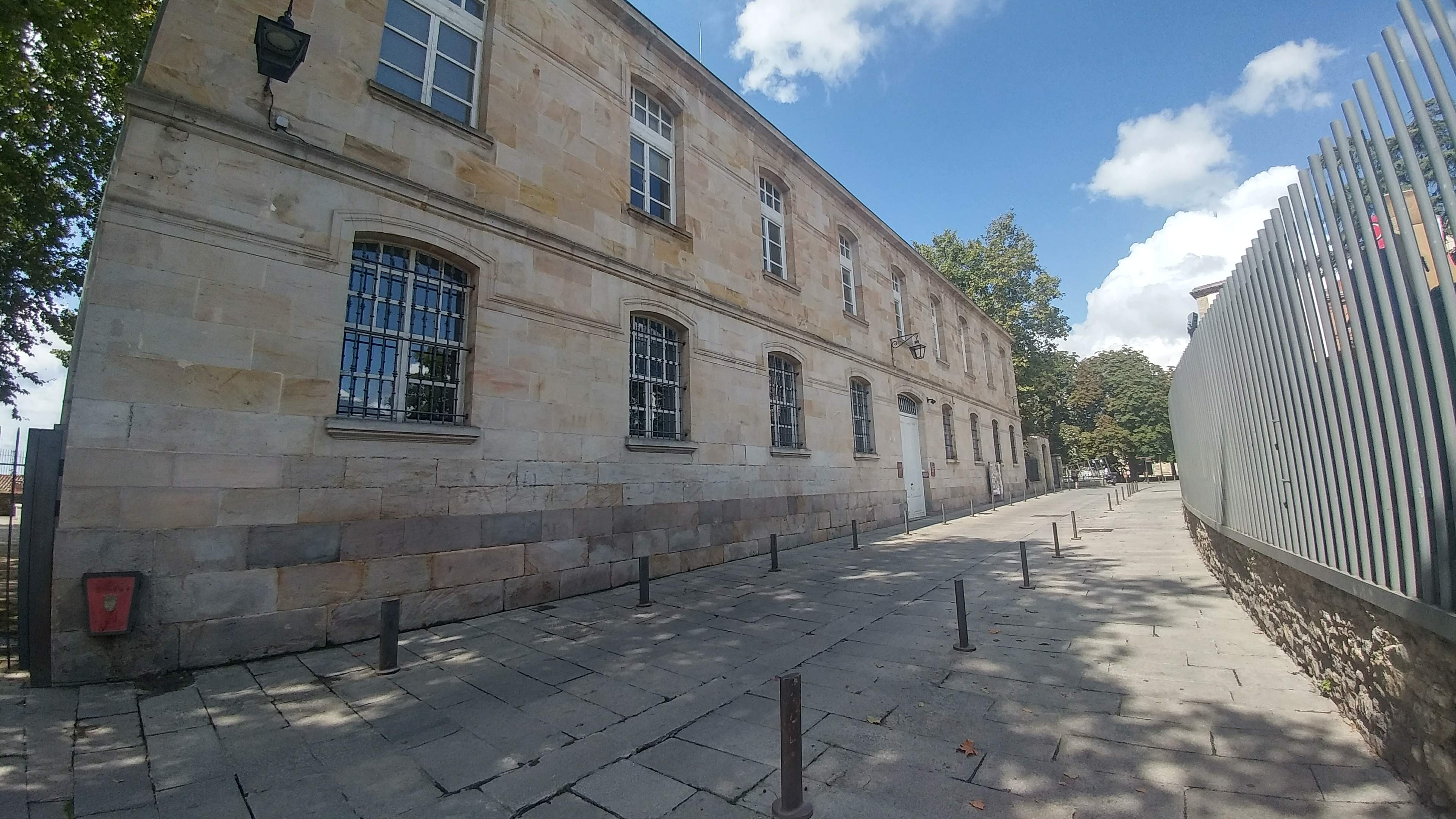 Gasteizko Alde Zaharrean dagoen Frai Zacarias Martinez eraikina